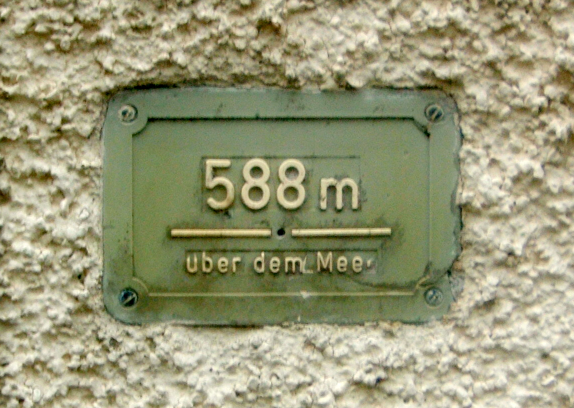 Schild mit Höhenangabe am Auernheimer Rathaus